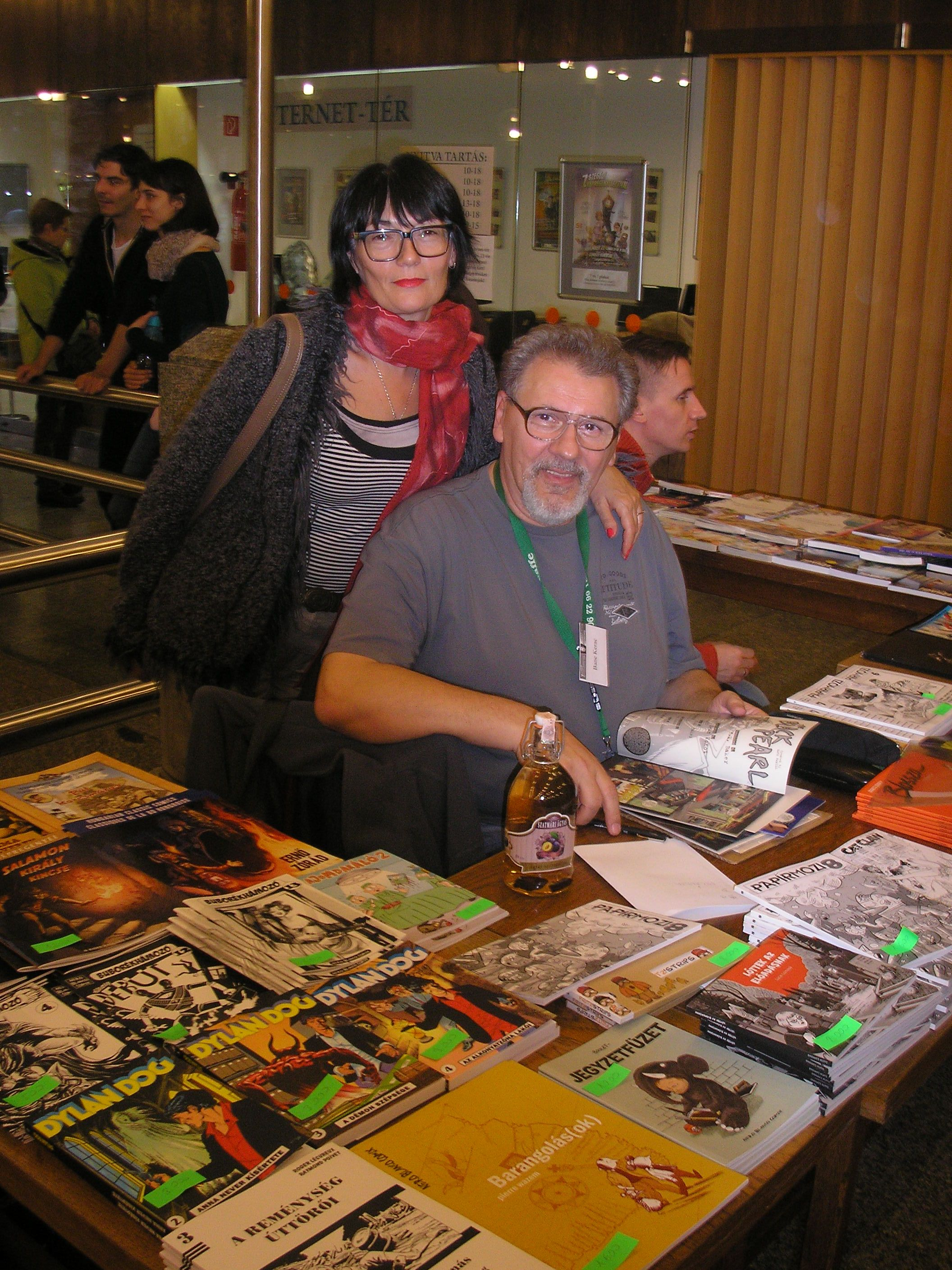 Branislav Kerac és felesége, Ljiljana, Somogyi Károly Városi és Megyei Könyvtár (Szeged)